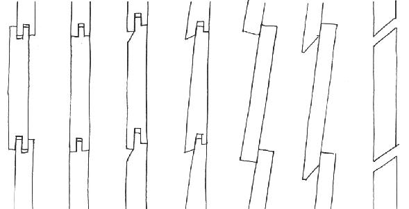 différents types de lames pour bardages en bois